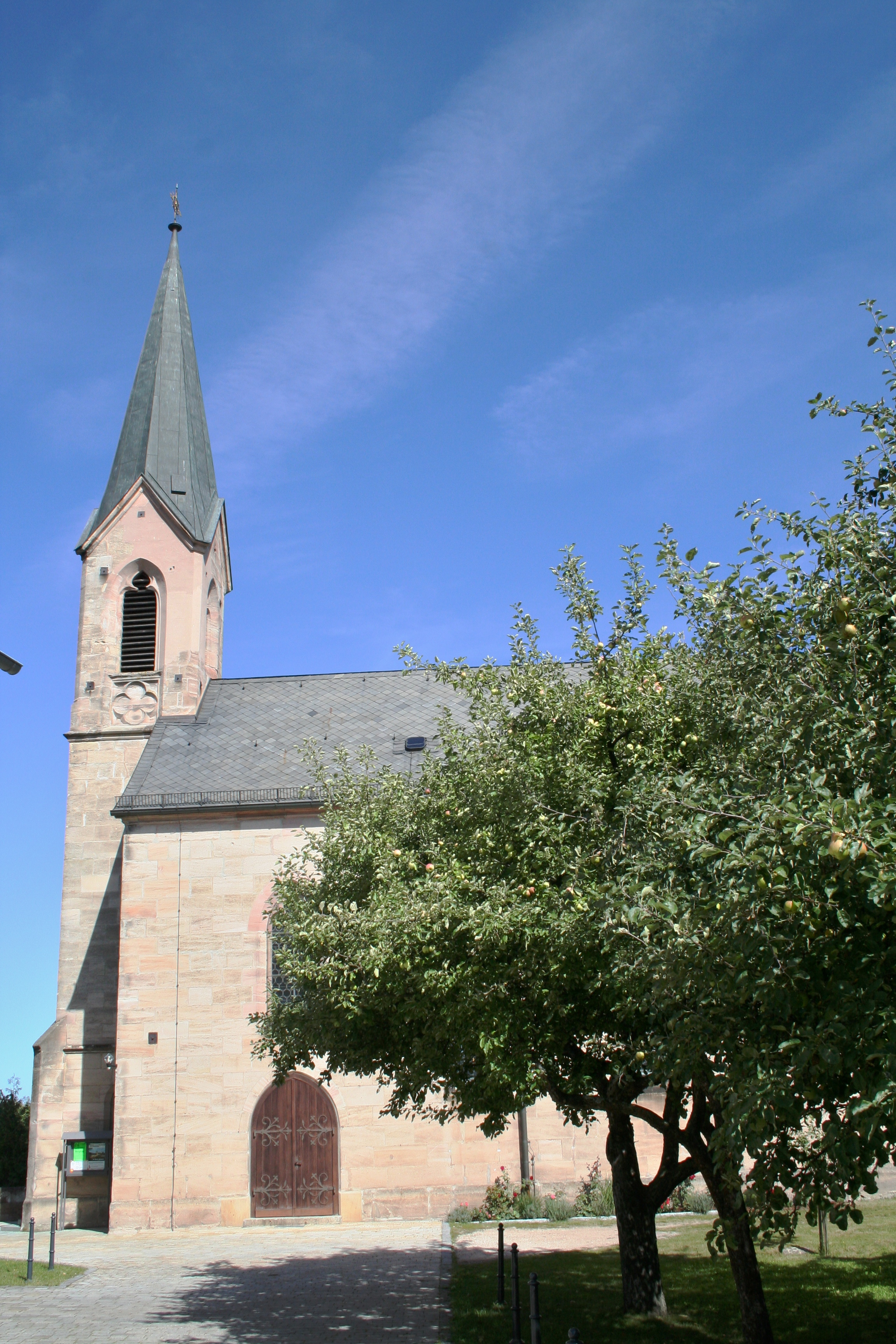 Pyrbaum